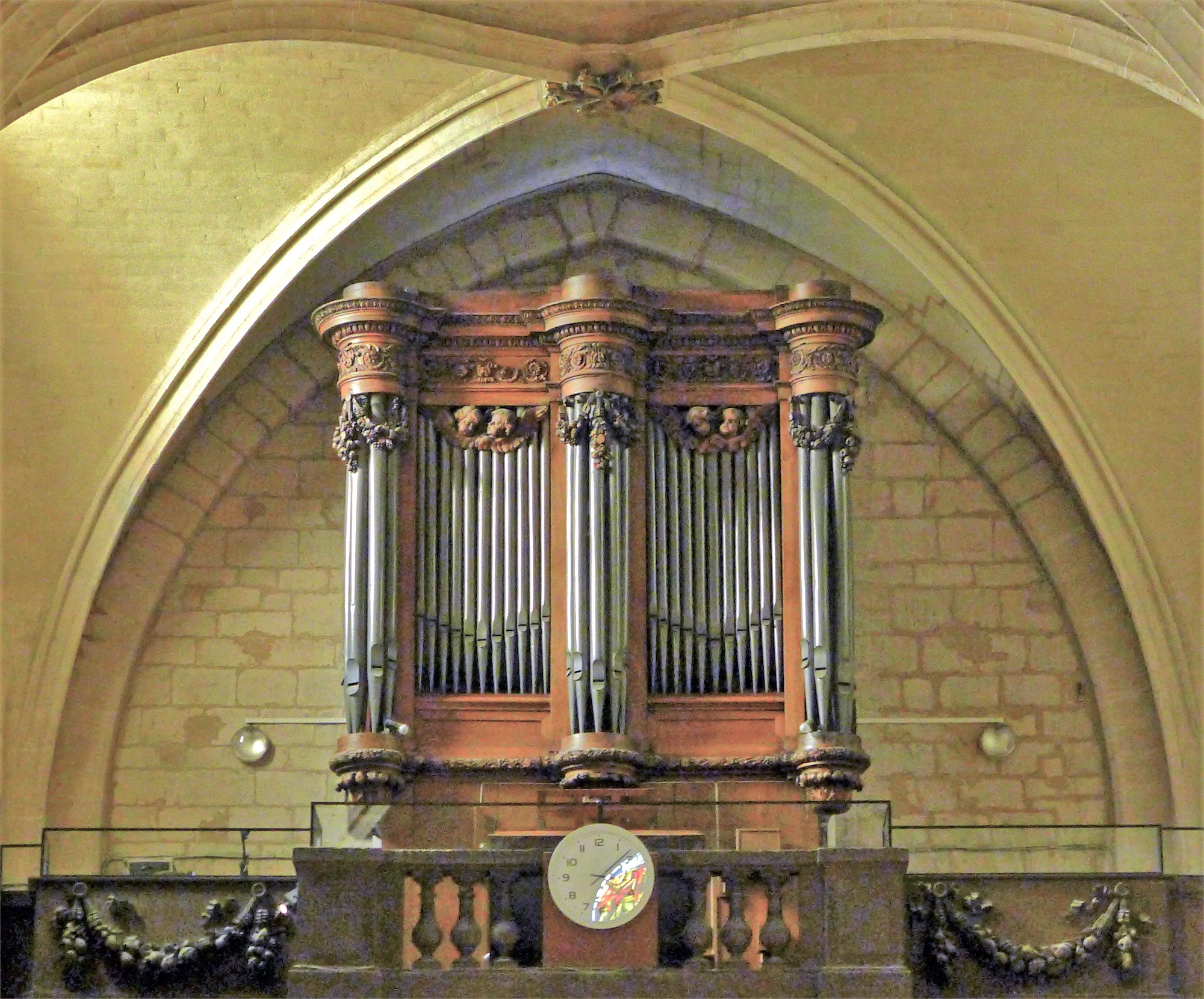 Église Saint-Pierre de Montmartre (orgue) - Paris XVIII